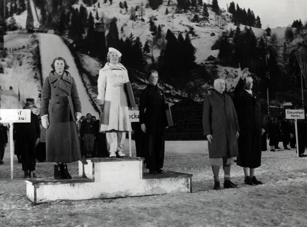 Olympische Winterspelen in Garmisch-Partenkirchen, Duitsland 1936. Foto: Kunstrijden op de schaats: ceremonie medaille uitreiking vlnr; Cecilia Colledge (GBR) 2e plaats, Sonja Henie (NOR) 1e plaats en Vivi Anne Hultën (ZWE) 3e plaats. Rechts de fascistengroet.